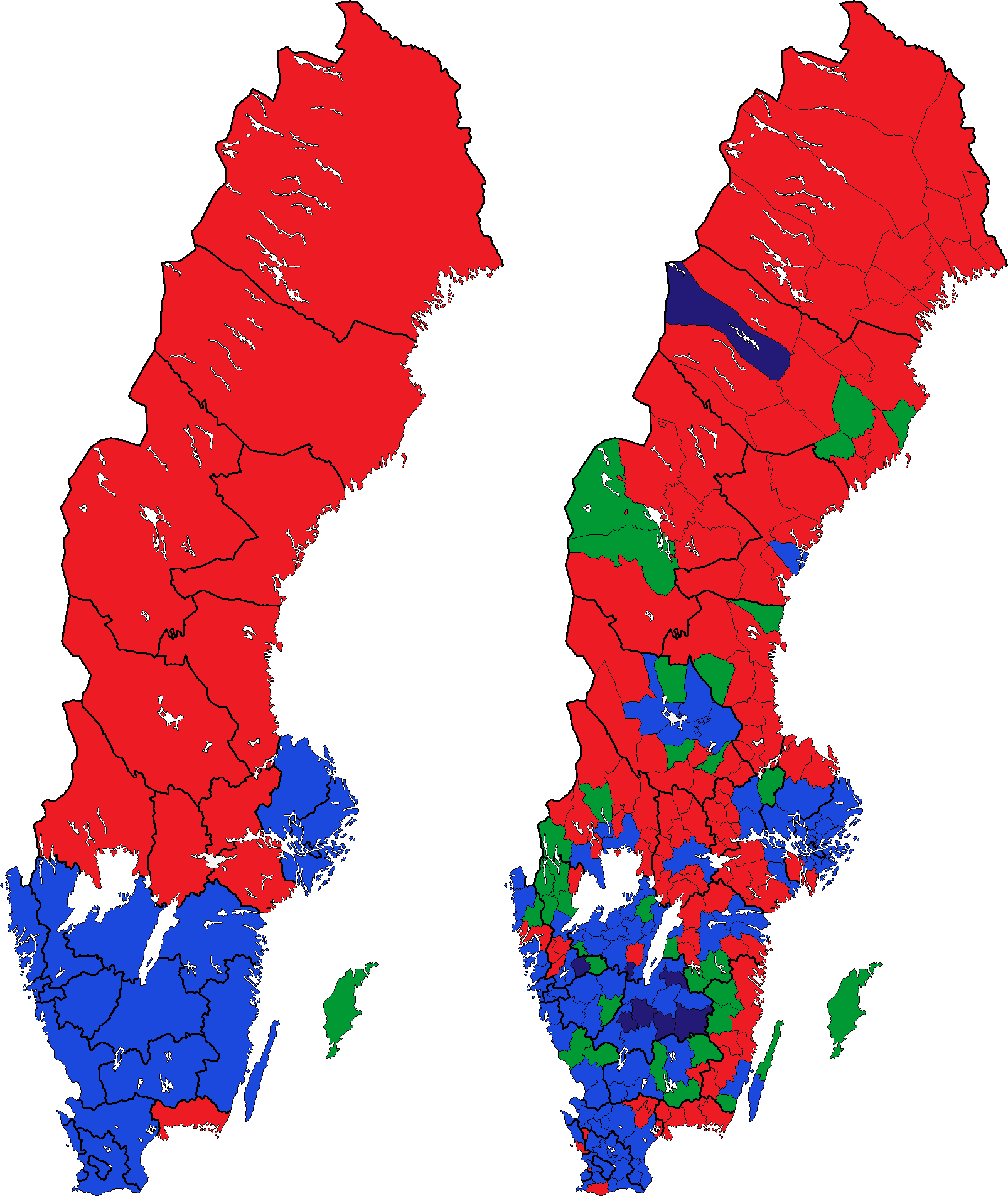 Största parti inom det ledande blocket i samtliga valkretsar och kommuner i riksdagsvalet 1991. Moderata samlingspartiet, Folkpartiet liberalerna, Centerpartiet och Kristdemokratiska samhällspartiet har räknats till det borgerliga blocket medan Arbetarpartiet-Socialdemokraterna och Vänsterpartiet har räknats till det socialistiska blocket. Partier därutöver räknas som egna block. Socialdemokraterna Moderaterna Centerpartiet Kristdemokraterna